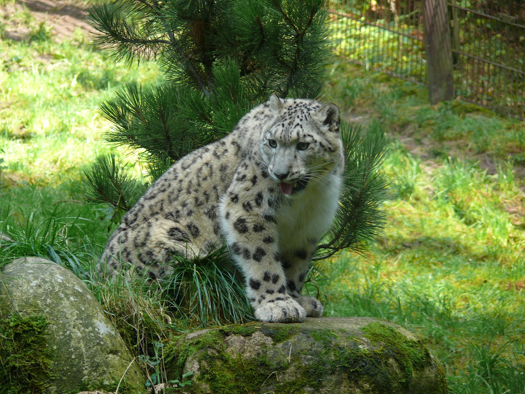 Schneeleopard (Uncia uncia)